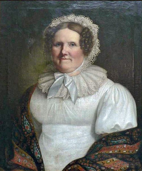 Anna Catharina Elisabeth Heinicke im Alter von 64 Jahren. Ölporträt von Wilhelm Gottfried Bauer (1779–1853)